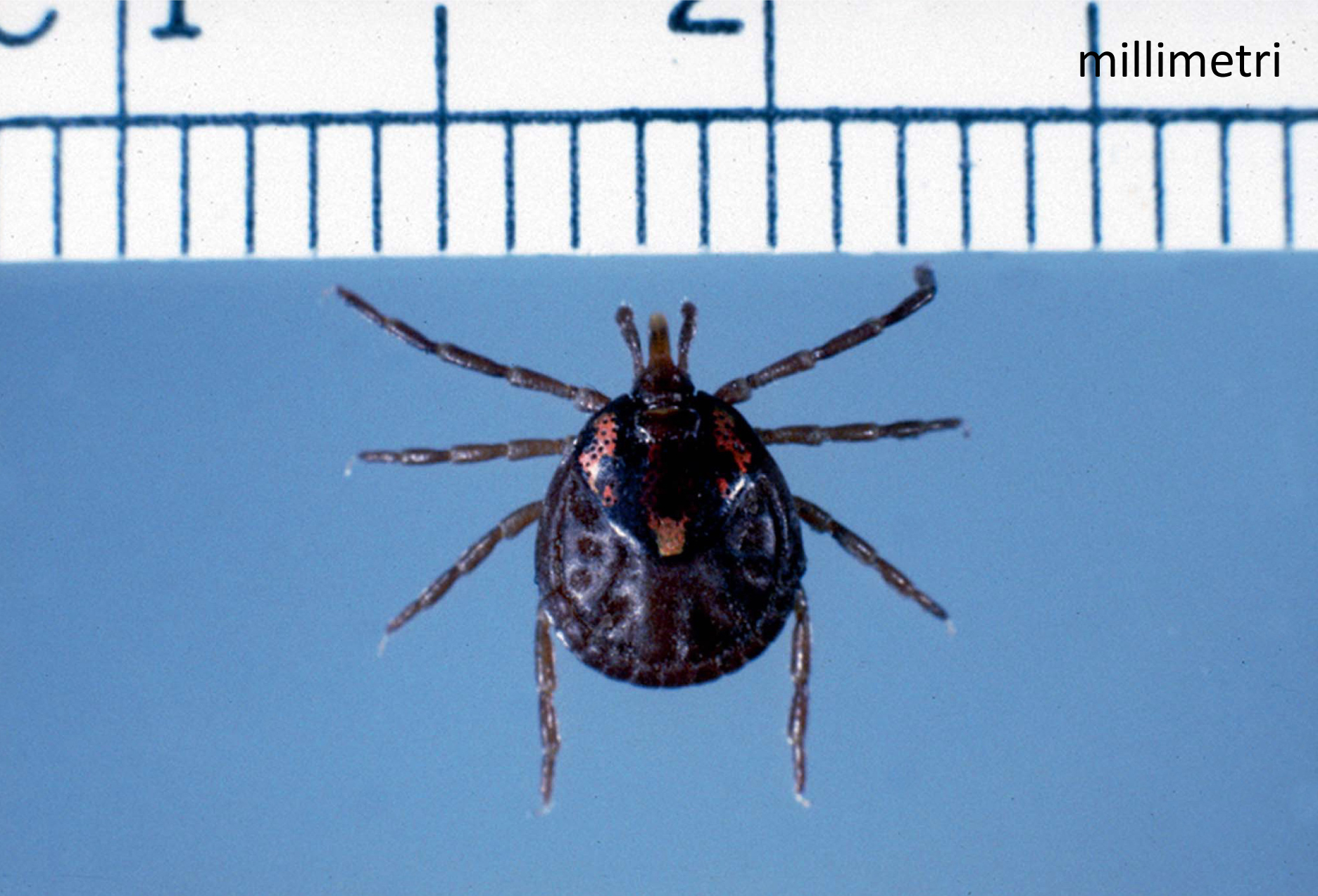 da i pesci